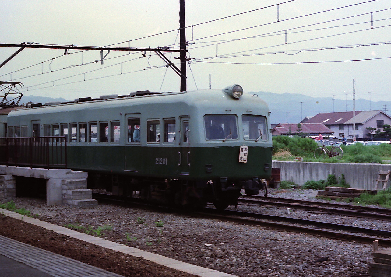 南海貴志川線 和歌山駅 クハ21201